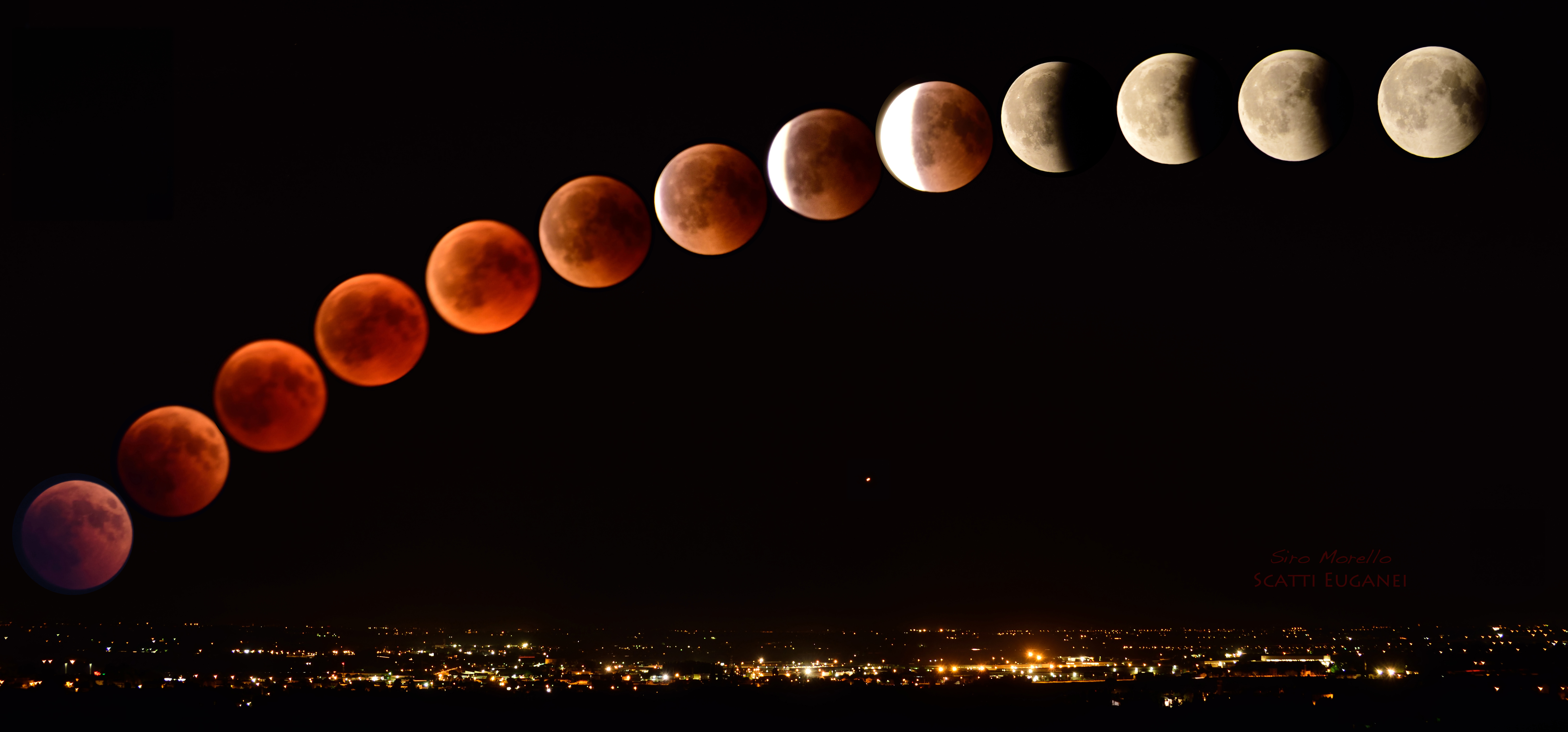 Dall'inizio della totalità all'uscita dal cono d'ombra. L'eclissi vista dai Colli Euganei